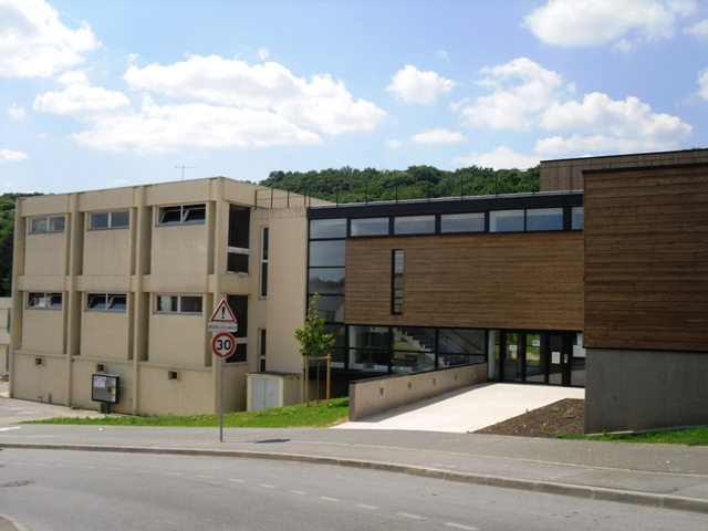 Le gymnase Marcel Cerdan d'Igny (91)